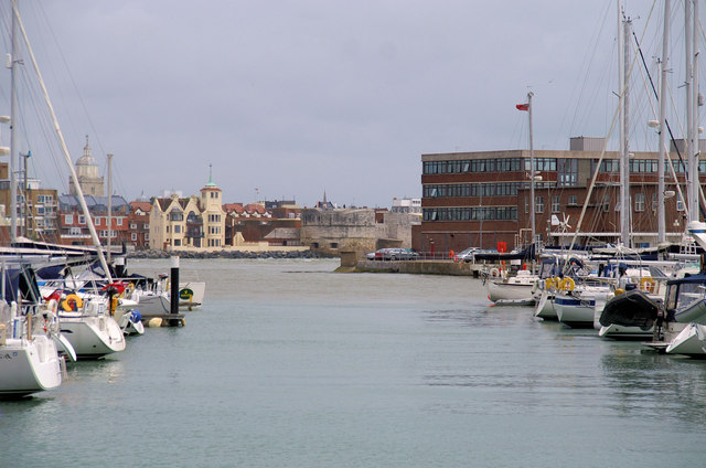 Haslar Marina